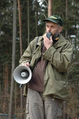 Foto Mojmíra Vlašína